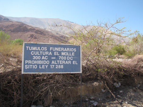 Pinte